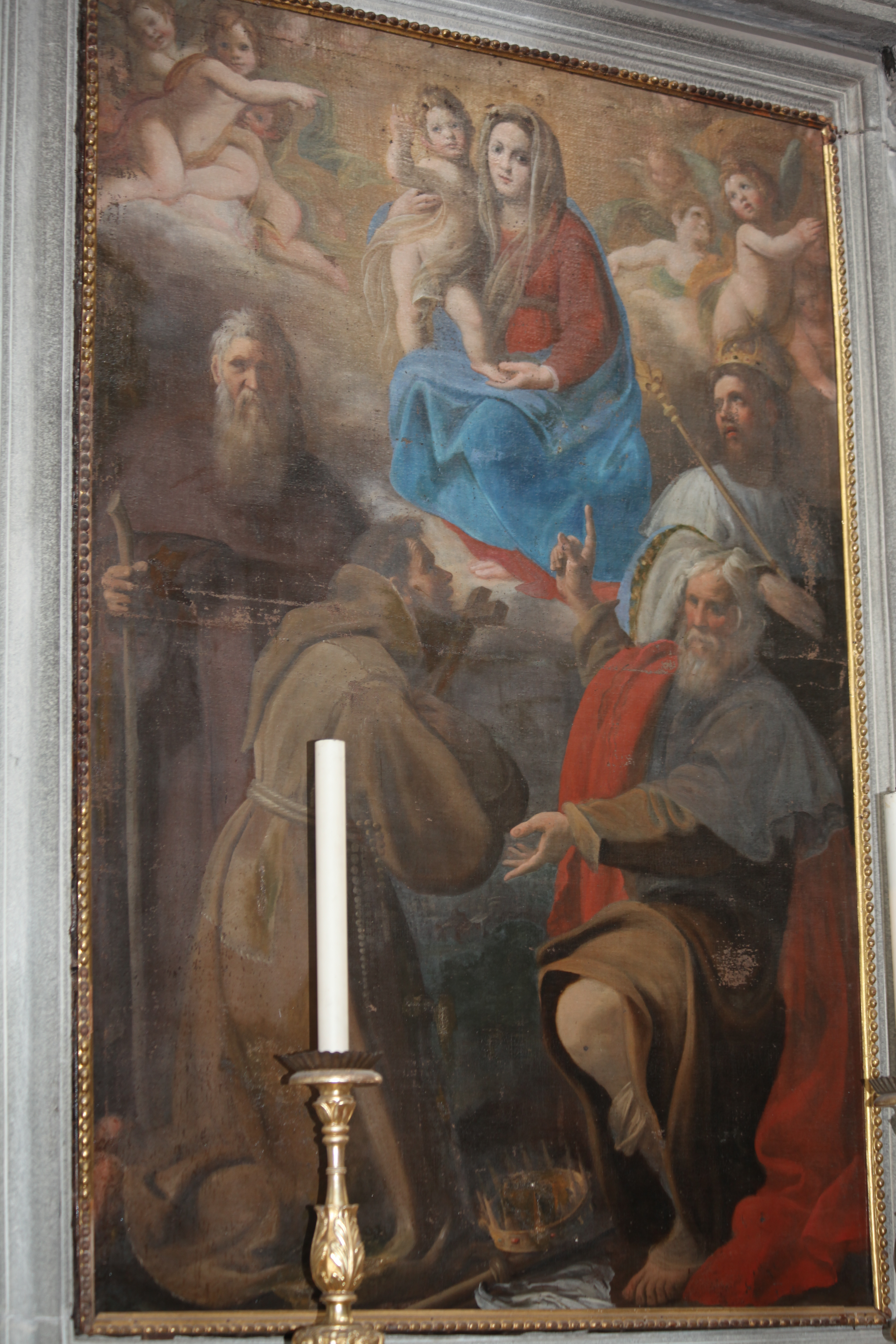 Madonna col Bambino e i Santi Antonio Abate, Francesco e altro Santo pellegrino di Baccio Ciarpi, inizio 600